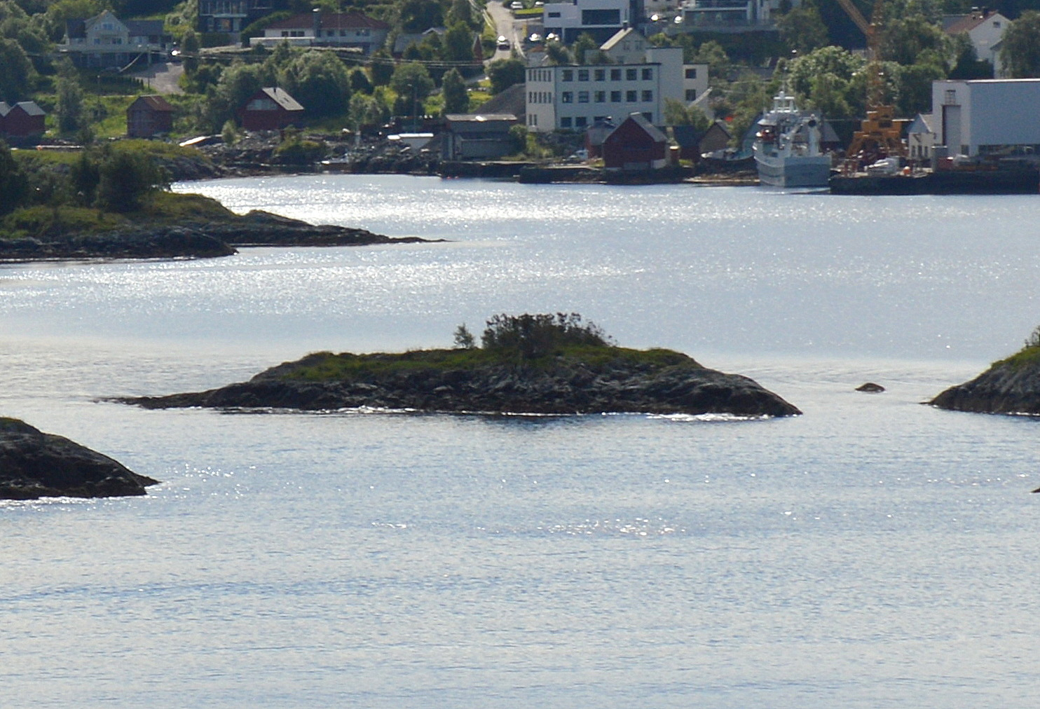 Insel Nålaugholmen bei Alesund